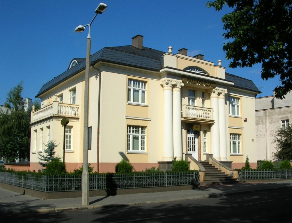 Aleja Ossolińskich 25 w Bydgoszczy